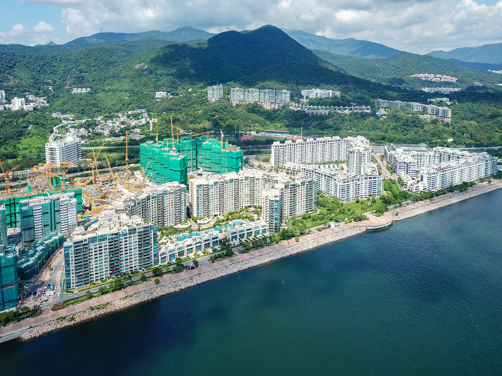 Providence Bay